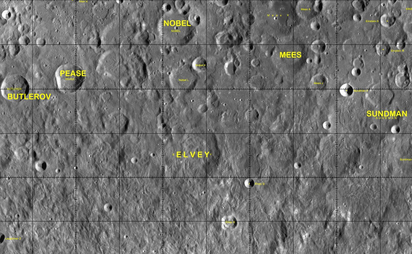 Cráter lunar Elvey. Localización (Imagen LROC)